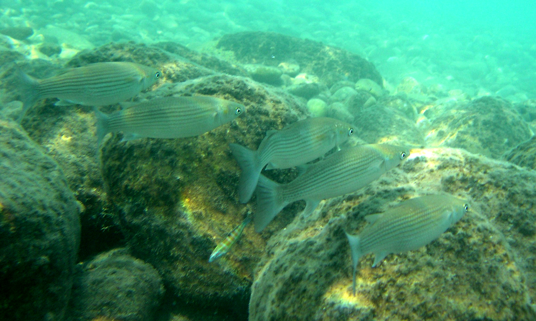 Mugilidae